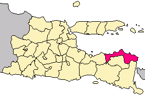 Carte indonésienne